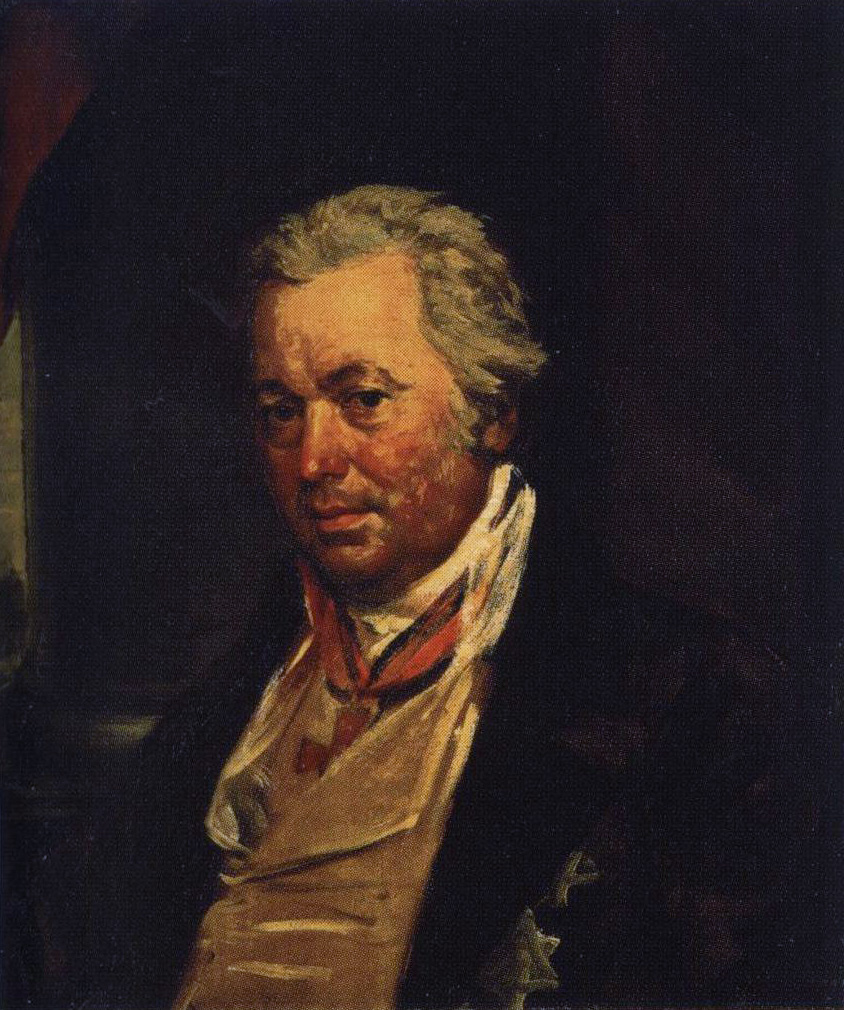 Портрет А. М. Римского-Корсакова